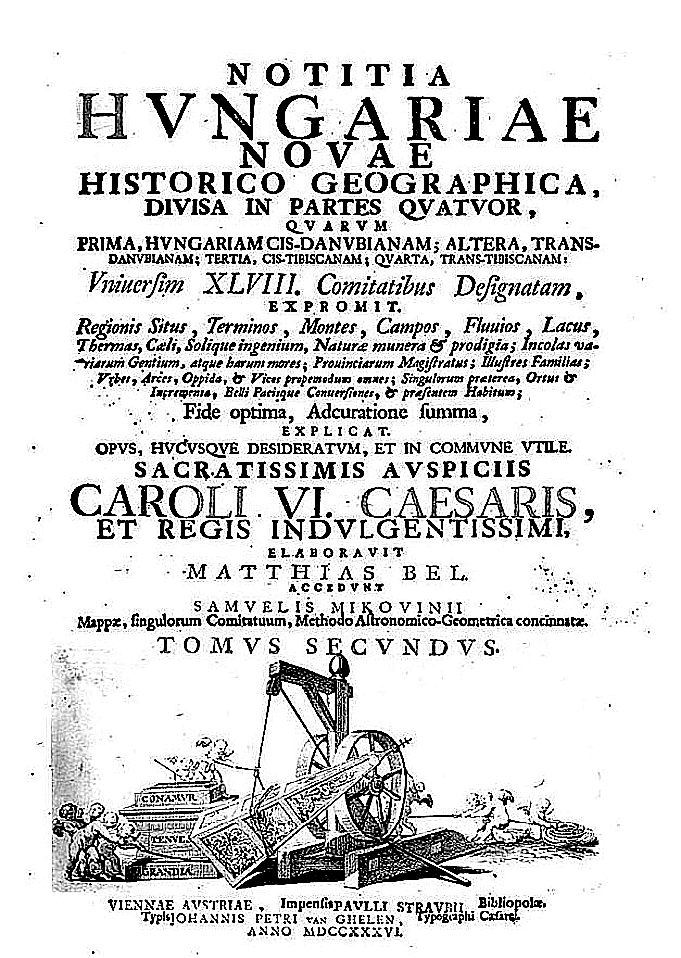 “Notitia Hungariae…” Bél Mátyás és Mikoviny Sámuel közös nagy művének címlapja.